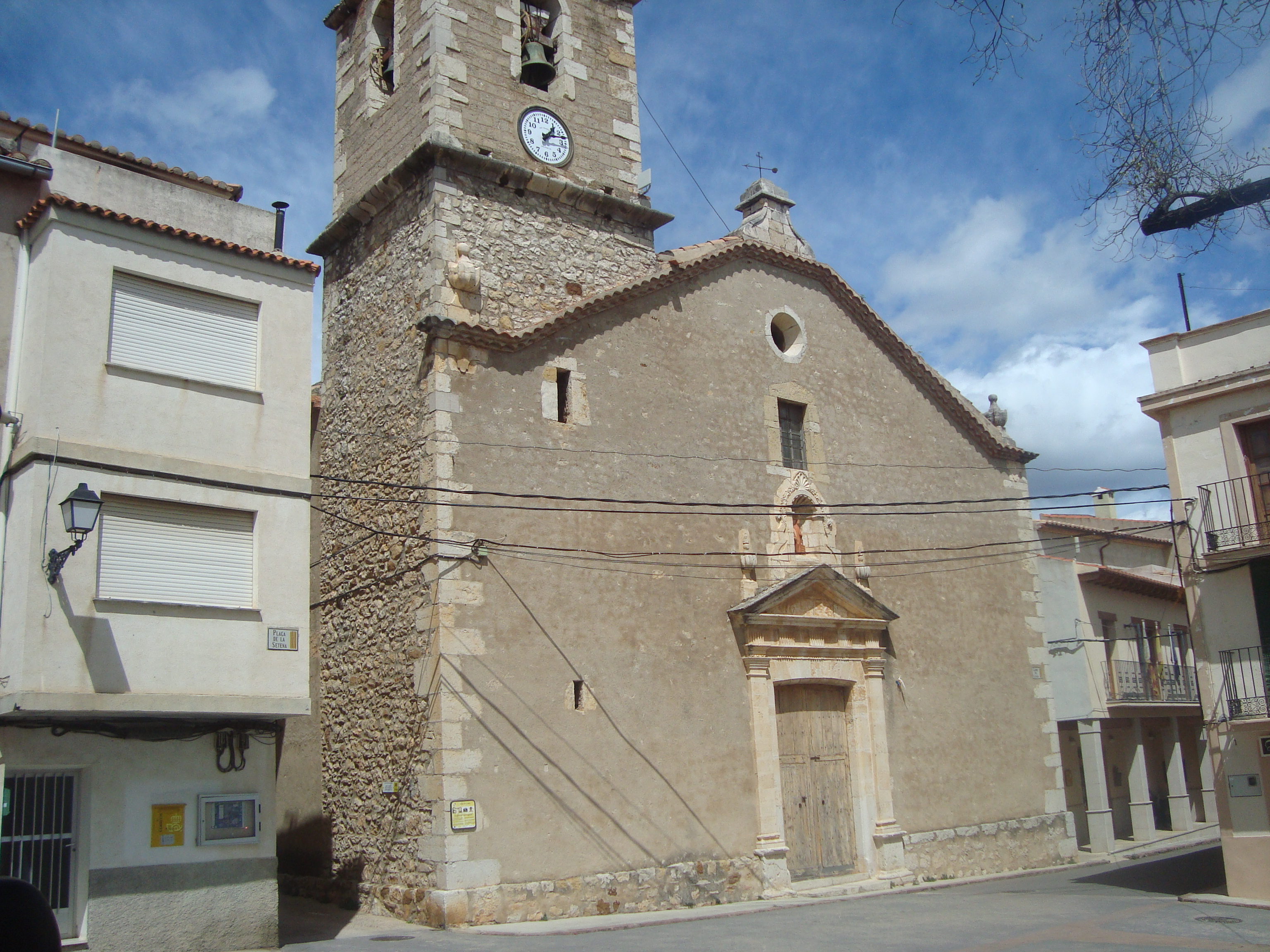 Església parroquial de Sant Llorenç (Vilar de Canes) 02.134-002.